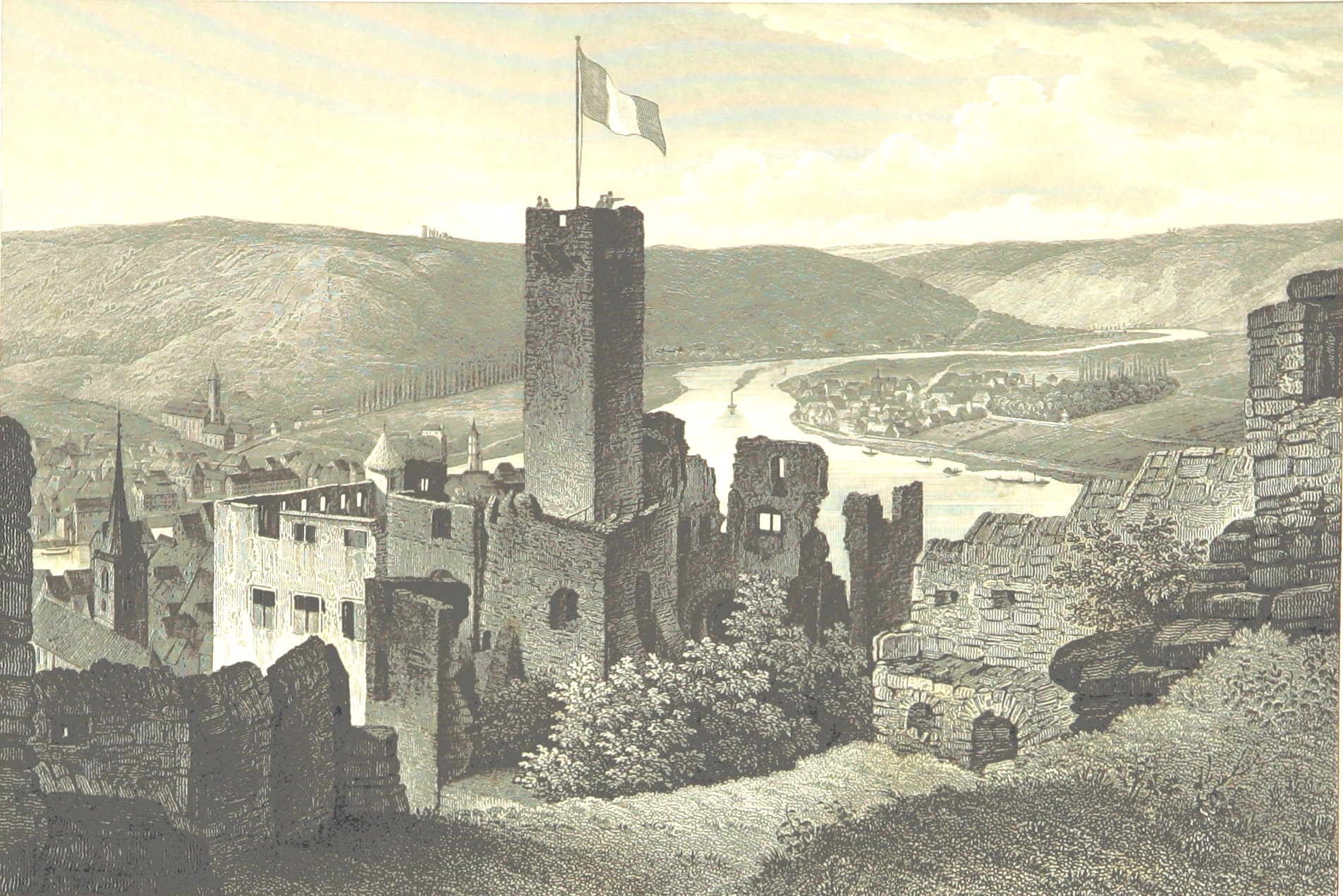 Burg Wertheim um 1845. Stahlstich nach Fritz Bamberger (1814-1873) aus dem Buch "Die Mainufer und ihre naechsten Umgebungen, mit 54 Stahstichen, nach Originalzeichnungen von Fritz Bamberger nebst einer Stromkarte vom Main" von Ludwig Braunfels (Text). Erschienen in Würzburg bei Etlinger in Lieferungen von 1844 bis 1847.